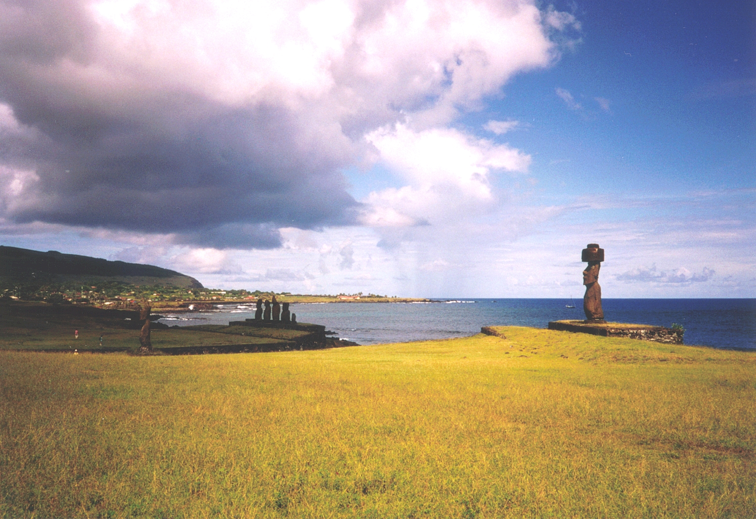 Osterinsel, Hanga Roa Hafen mit Moai Ko te Riko